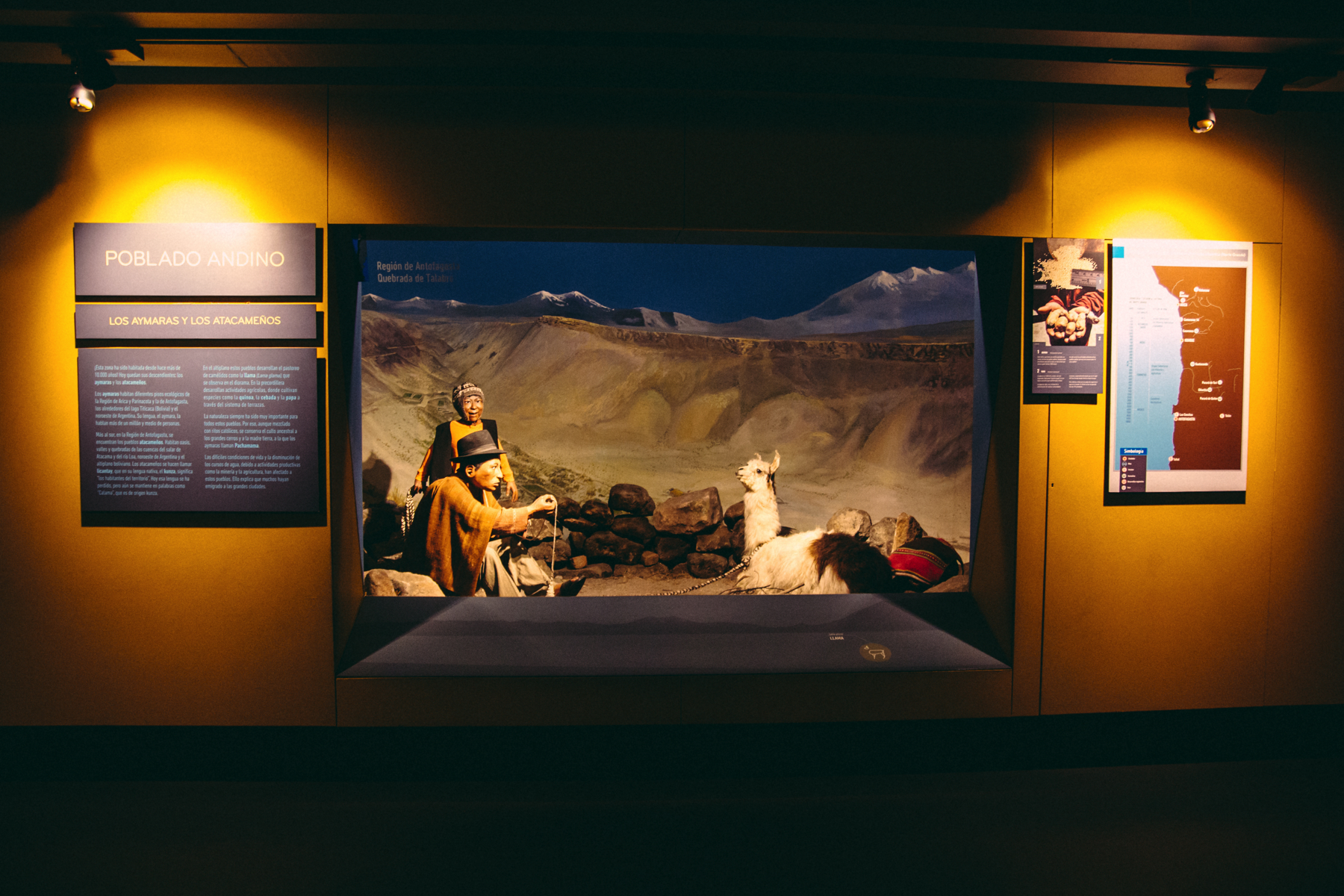 Museo Nacional de Historia Natural, Santiago, Chile